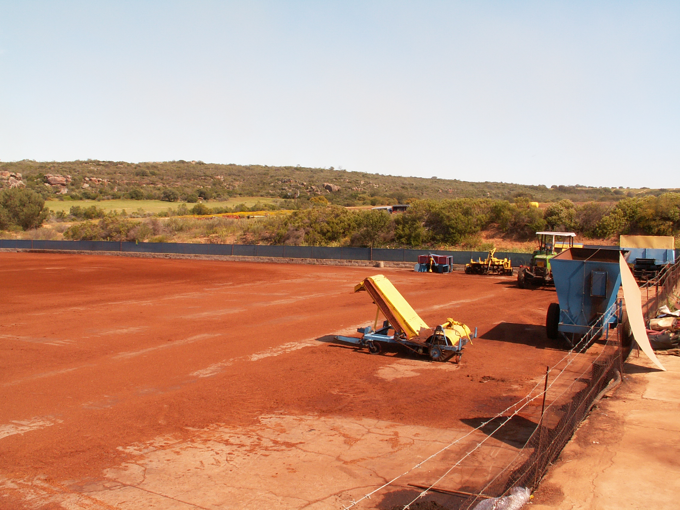 Rooibosh-Farm in Clanwilliam, hier wird die Rohware im Freien getroknet + fermentiert